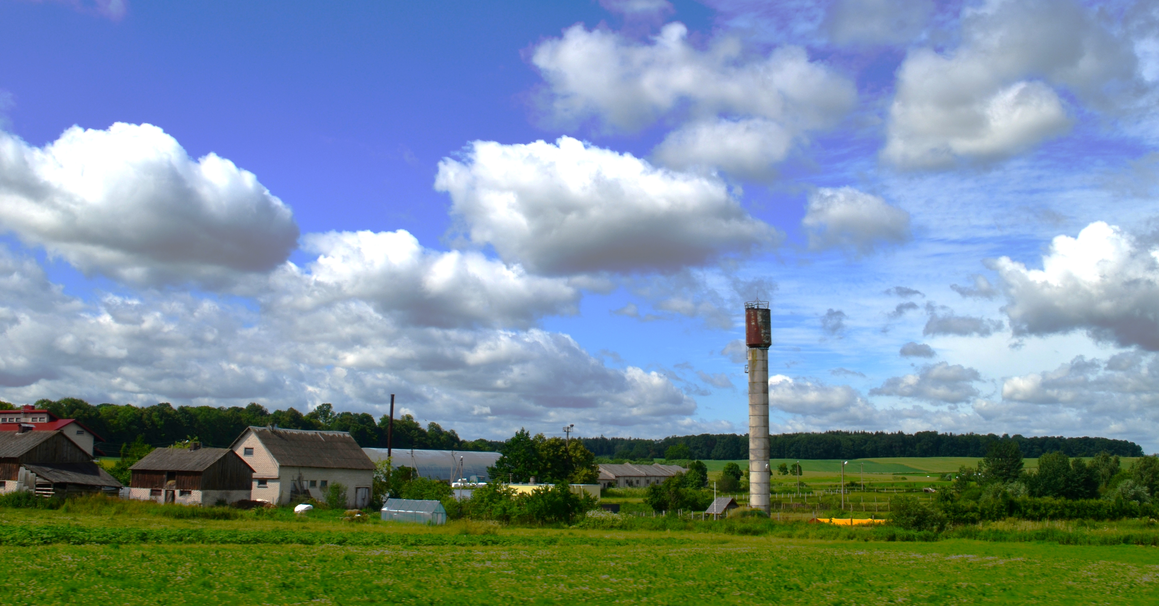 Kalesninkai (prie Simno), Alytaus raj.